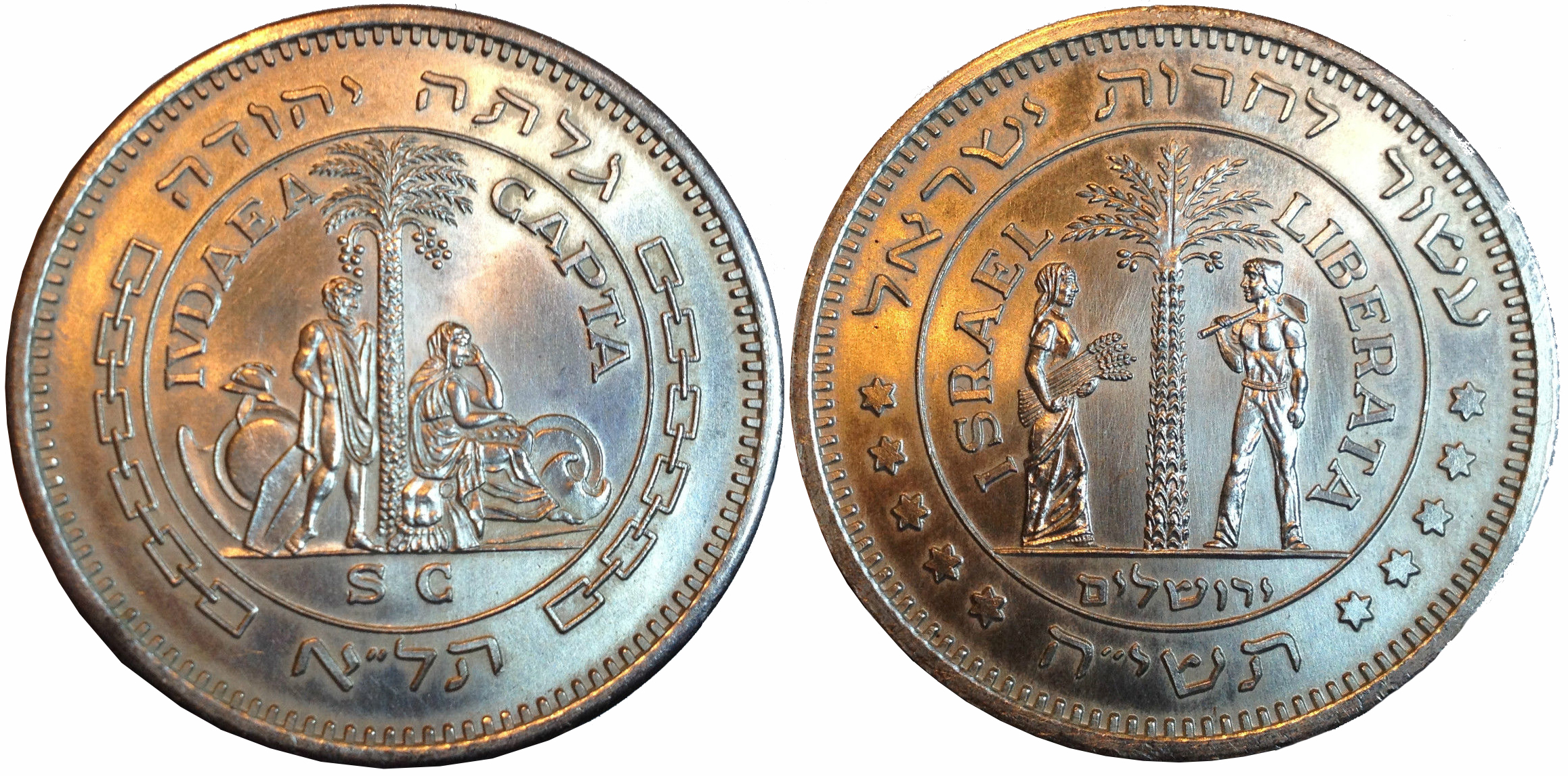 מדליית חירות ישראל, כסף